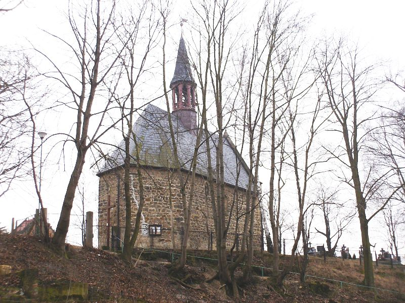 Wysocko - rzymskokatolicki kościół filialny, XV